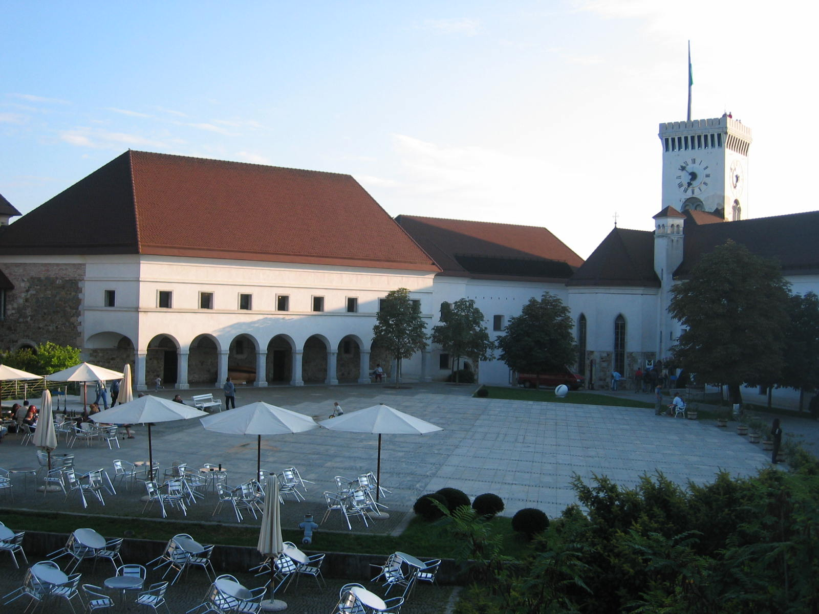 Ljubljana castle-square photo:Ziga 13:35, 30 April 2006 (UTC)